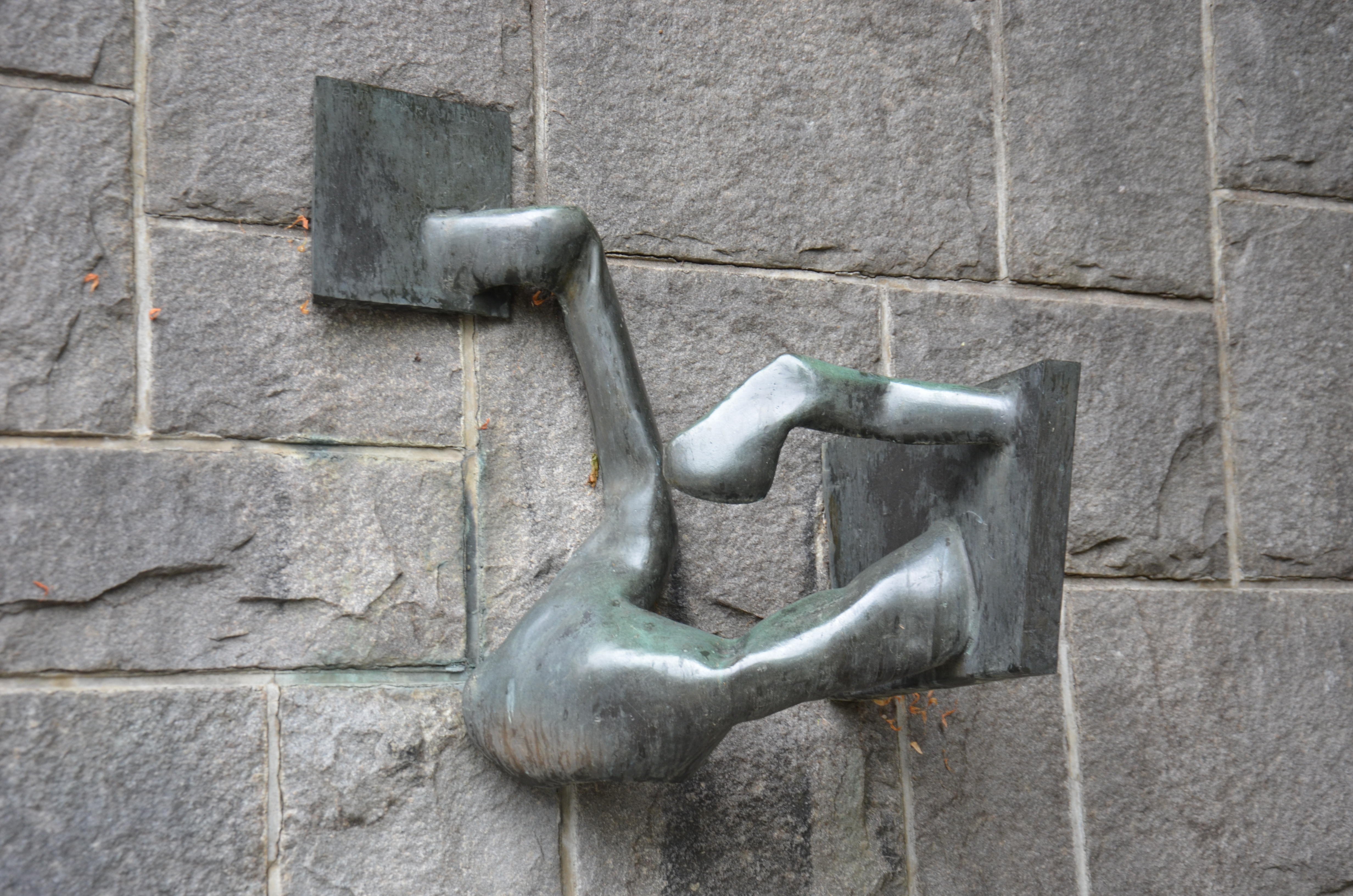 Födelsen av Berto Marklund, norr om Vårbergs tunnelbanestation